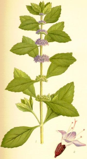 Åkermynta (Mentha arvensis) växtens översta del, en tvåkönad blomma, sedd från sin högra sida (10/1)